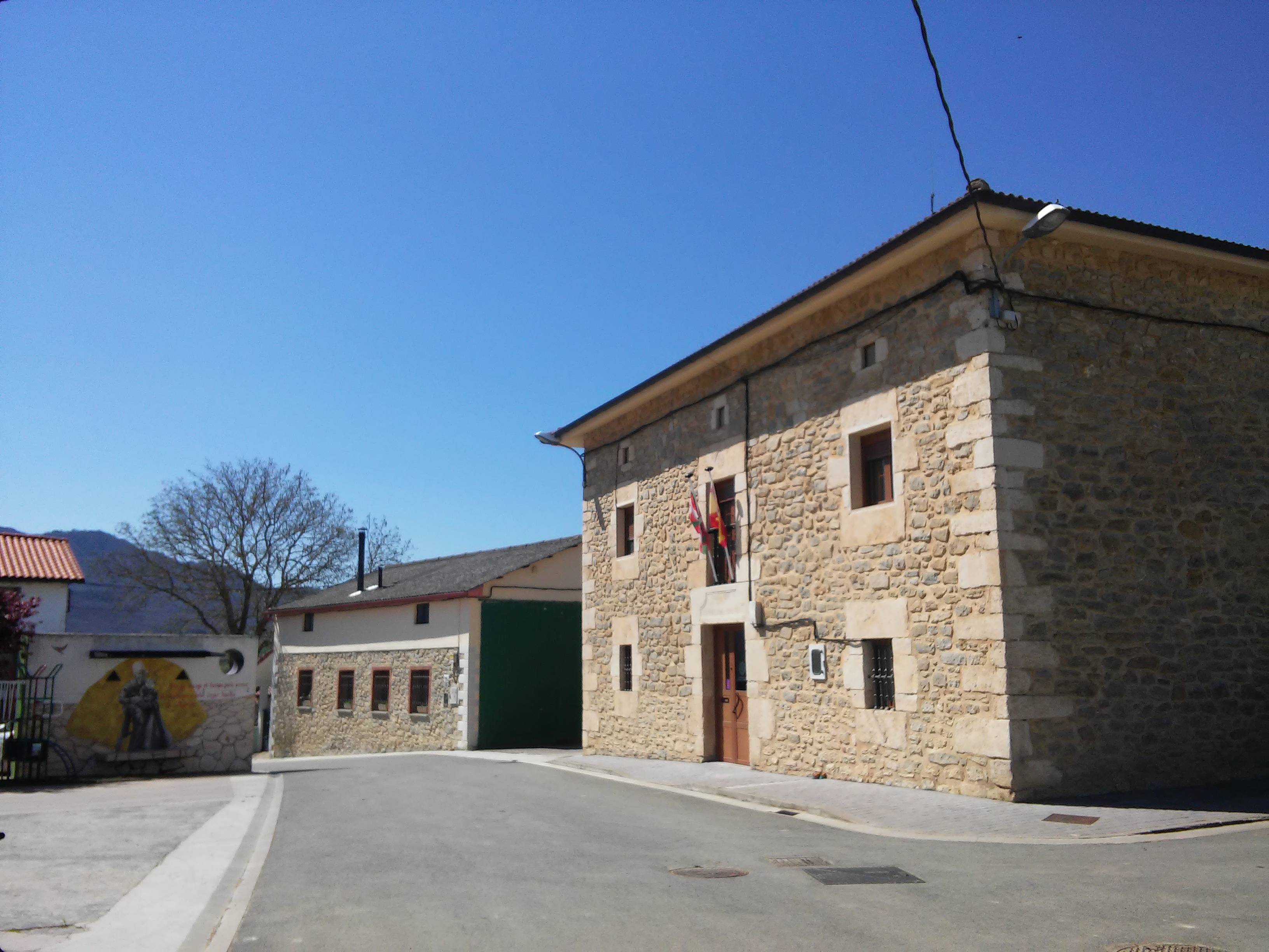 Iruraitz-Gaunako udaletxea (Azilu)